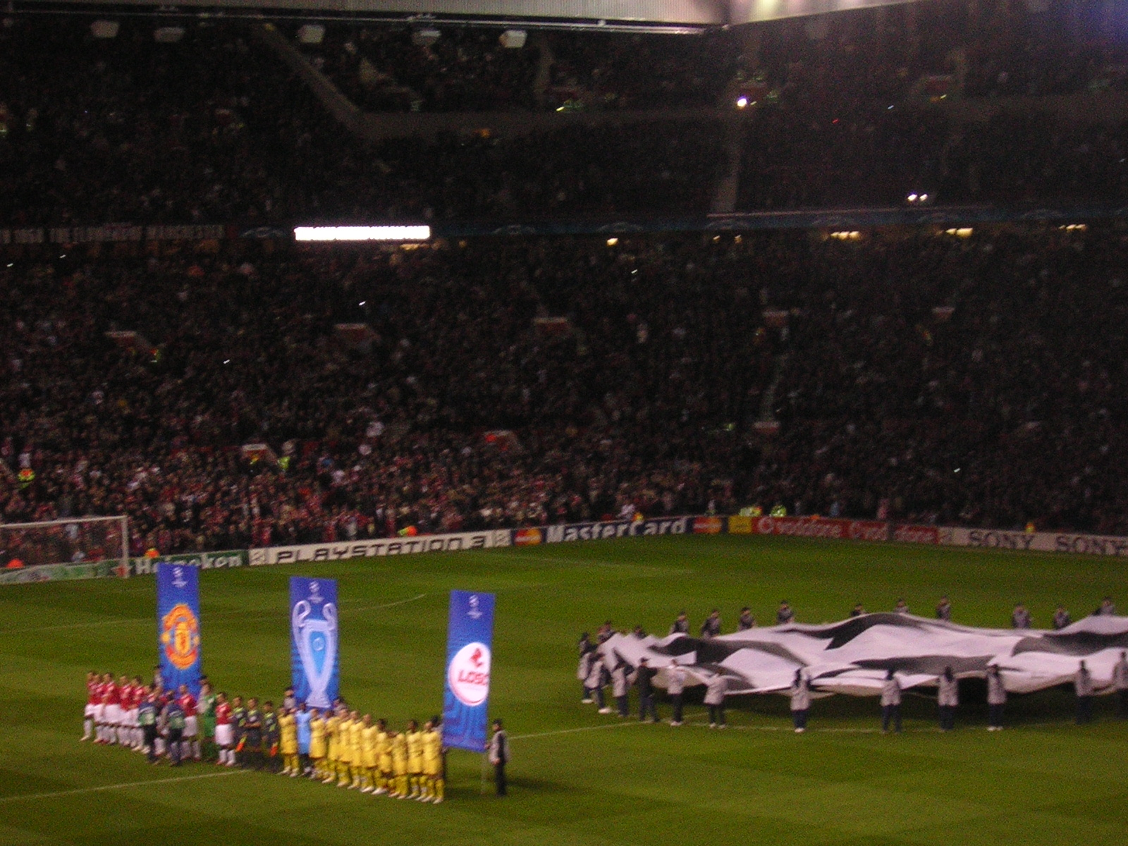 Huitième de finale retour Ligue des Champions 2006-2007.